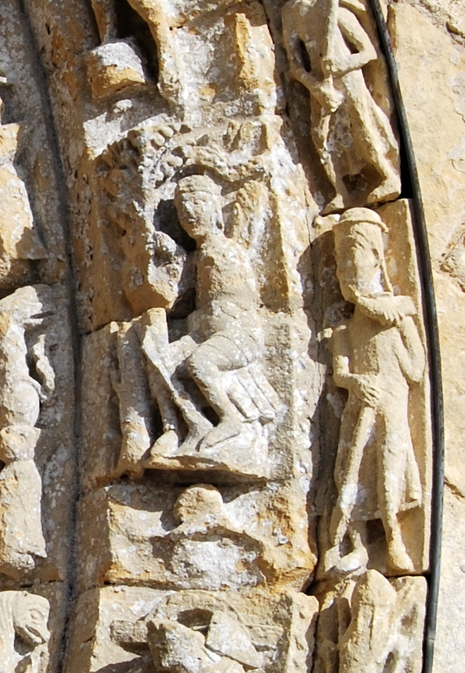 Détails du Zodiaque du Portail